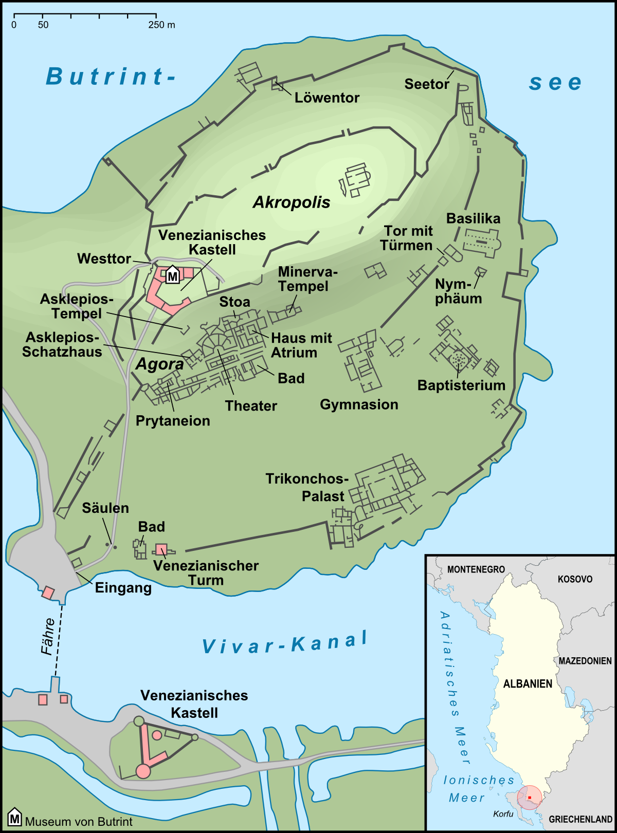 Karte von Butrint